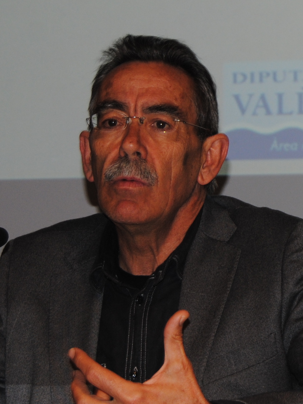 12 d'abril de 2016, Museu Valencià de la Il·lustració i la Modernitat